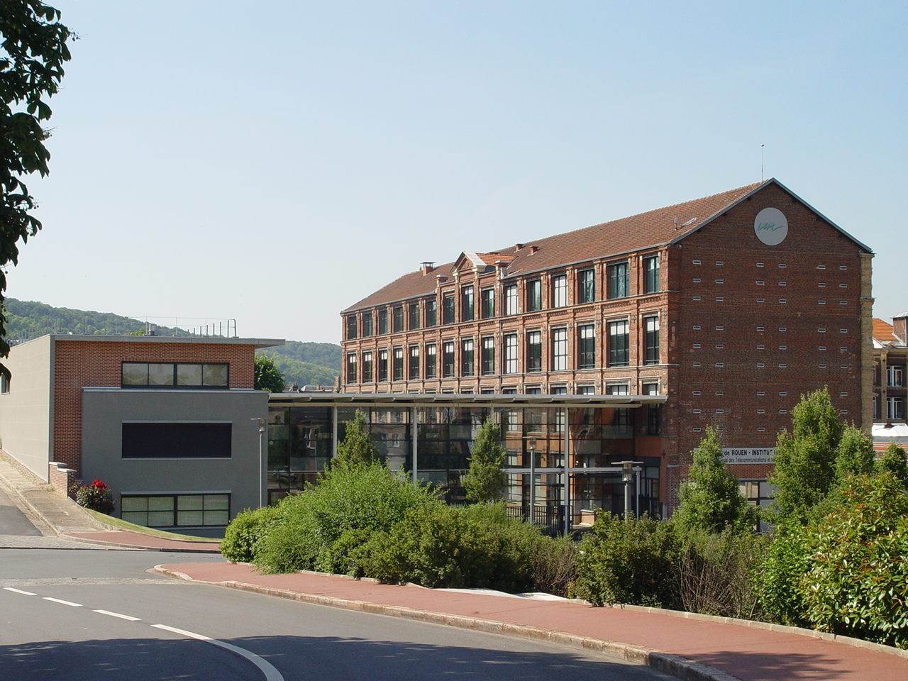 Vue du site d'Elbeuf de l'IUT de Rouen